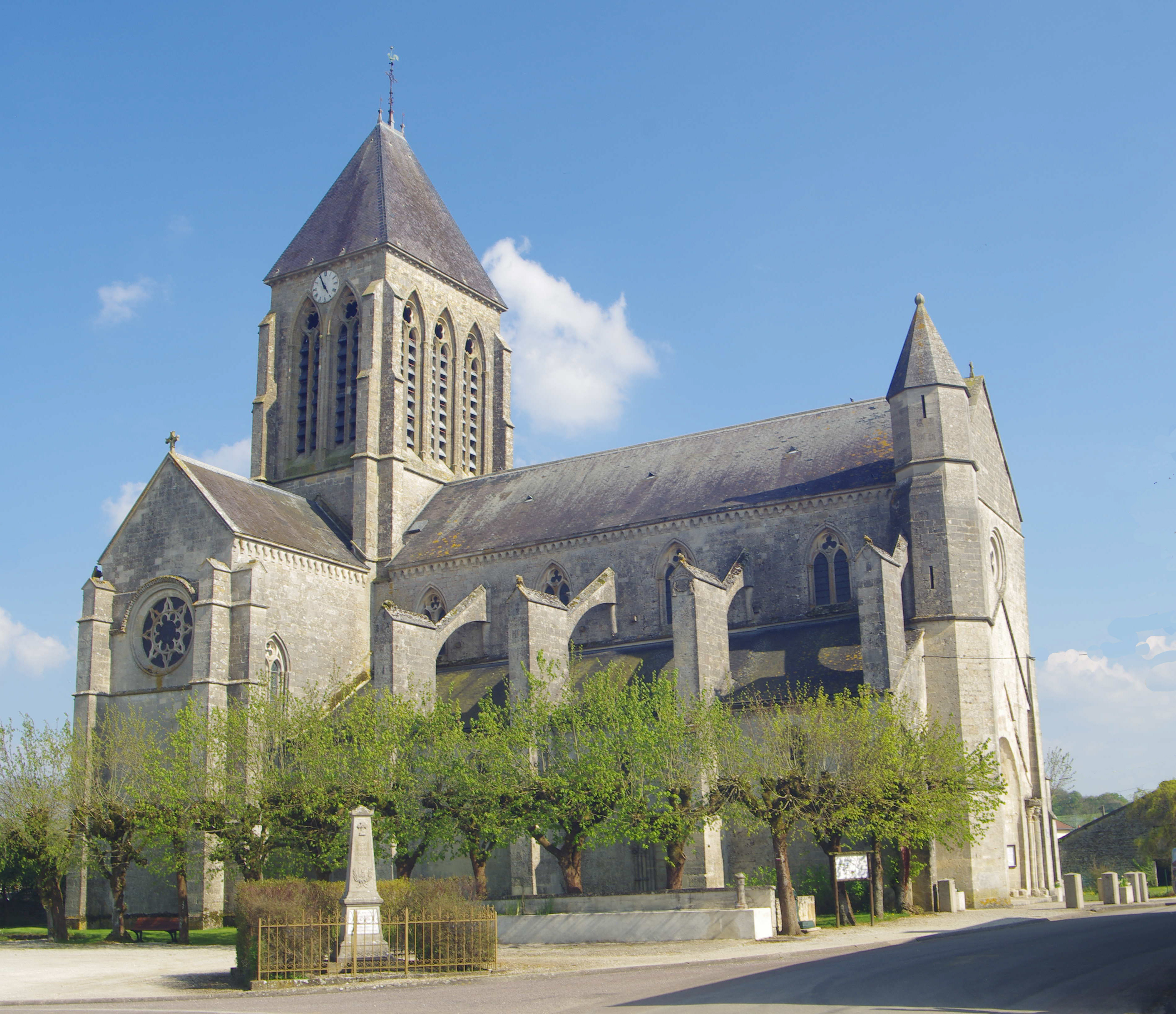 Église Notre-Dame de Blécourt